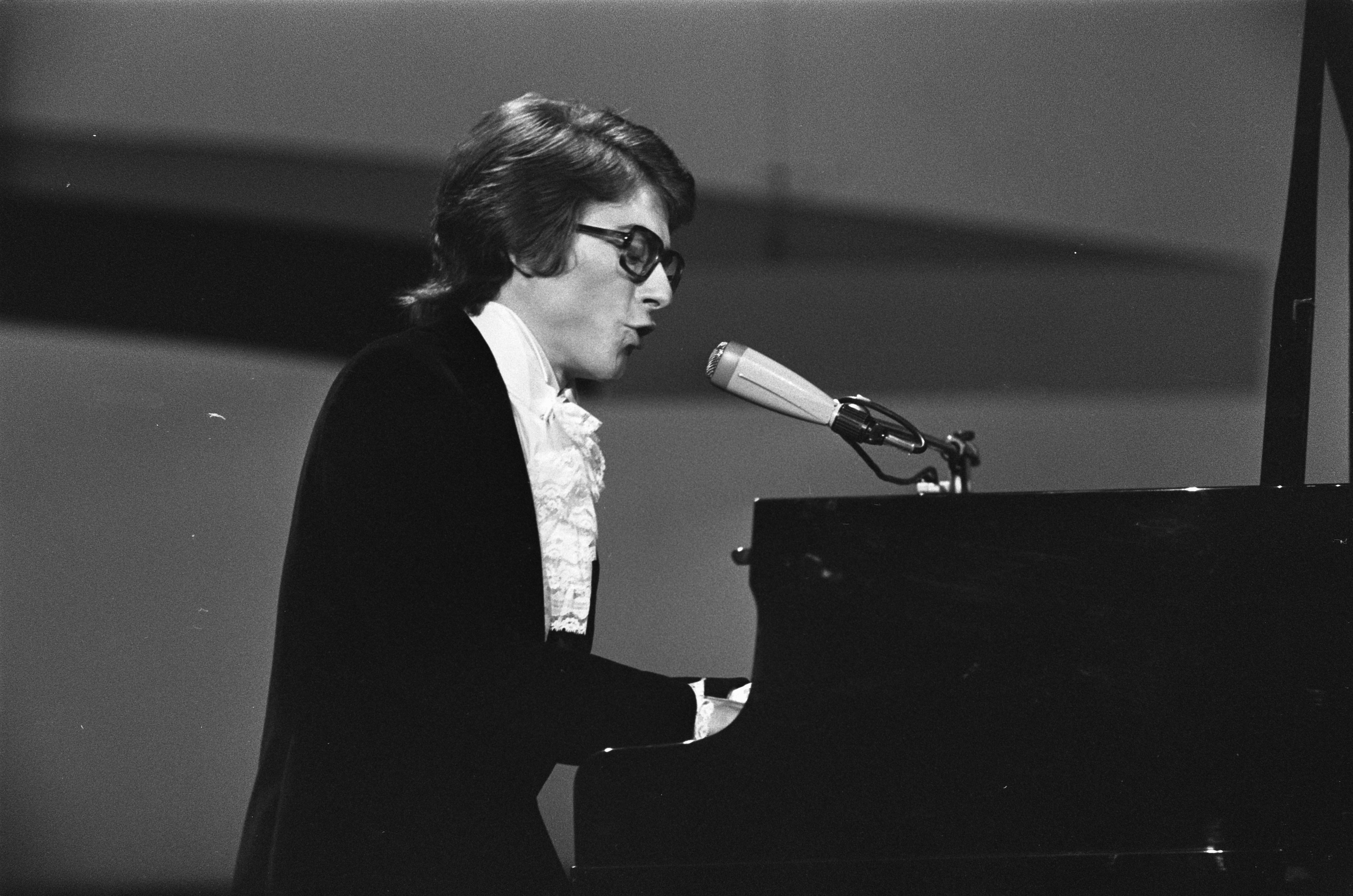 Collectie / Archief : Fotocollectie Anefo Reportage / Serie : Eurovisie Songfestival 1970 in RAI te Amsterdam Beschrijving : Guy Bonnet (Frankrijk) Datum : 21 maart 1970 Locatie : Amsterdam, Frankrijk Trefwoorden : artiesten, songfestivals, zangers Persoonsnaam : Bonnet, Guy Instellingsnaam : Eurovisie Song Festival Fotograaf : Koch, Eric / Anefo Auteursrechthebbende : Nationaal Archief Materiaalsoort : Negatief (zwart/wit) Nummer archiefinventaris : bekijk toegang 2.24.01.05 Bestanddeelnummer : 923-3711